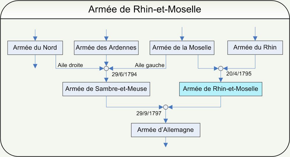 Ordinogramme de l'armée de Rhin-et-Moselle Dessin réalisé par Papier K